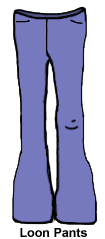 Loon Pants